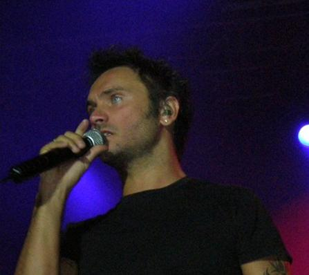 Nek en concierto en Valladolid por las fiestas patronales. 6 de Septiembre de 2009